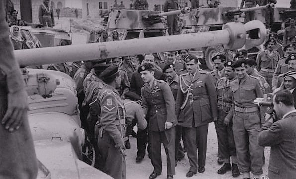 صورة تاريخية نادرة لجلالة الملك الحسين المغفور له ،مع سلاح الدروع الملكي الأردني قديما